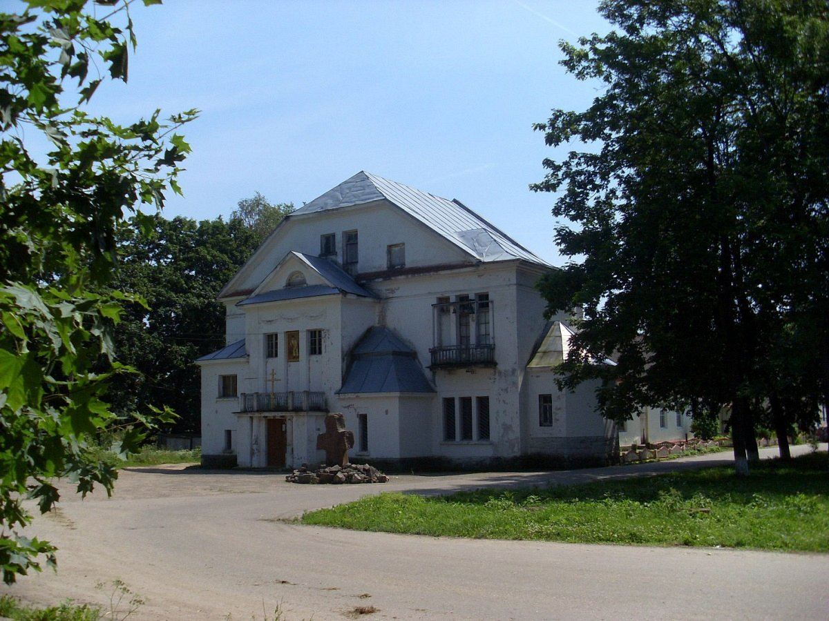 Межава. Сядзібна-паркавы ансамбль Любенскіх